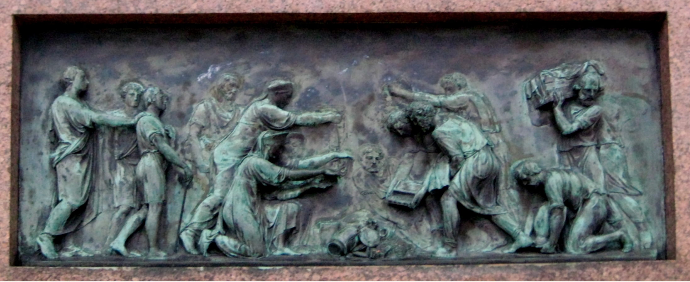 Памятник Минину и Пожарскому. Панно-рельеф на пьедестале